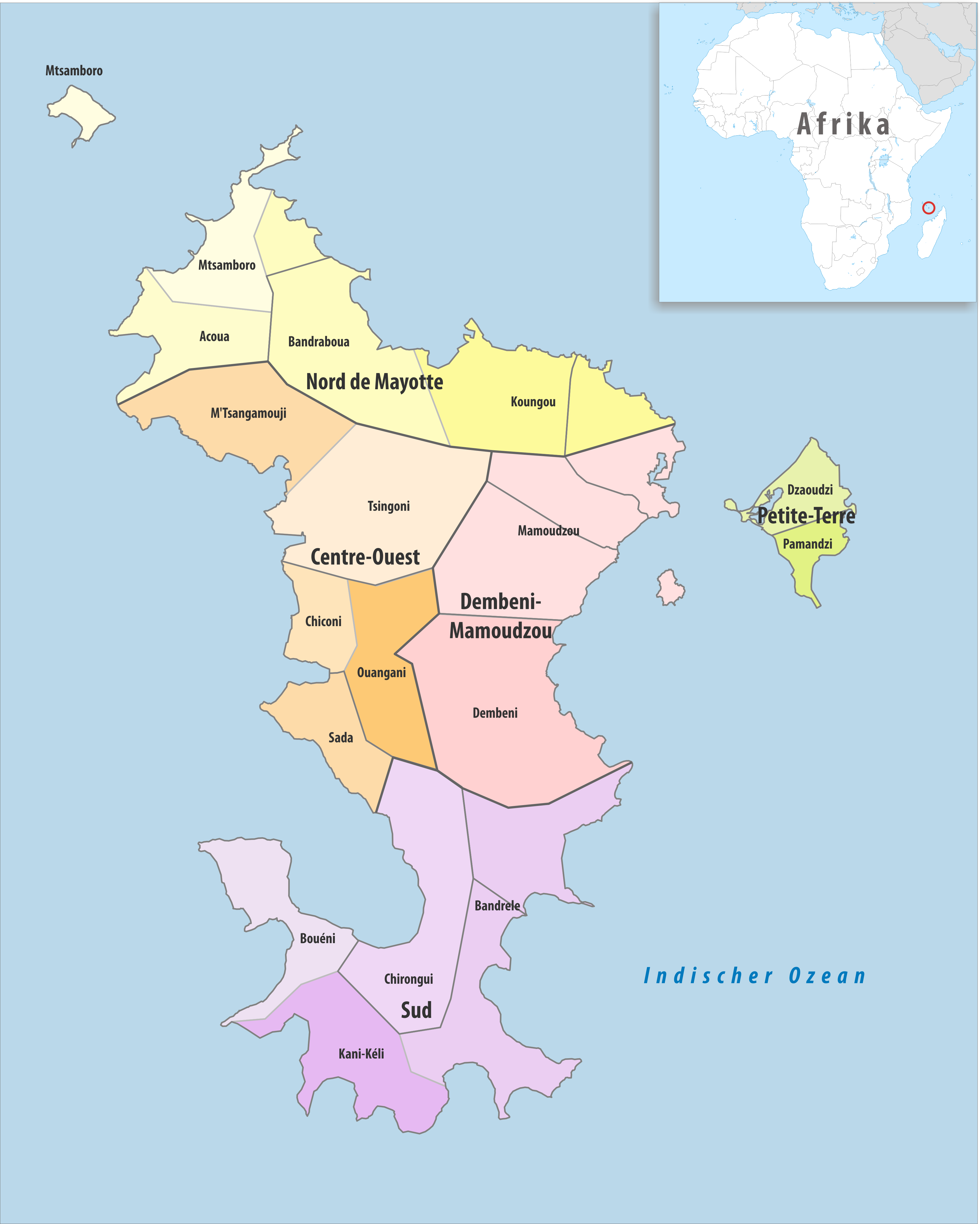 Gemeinden und Gemeindeverbände in Mayotte